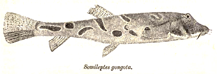 Somileptes gongota = Somileptus gongota (Hamilton, 1822)